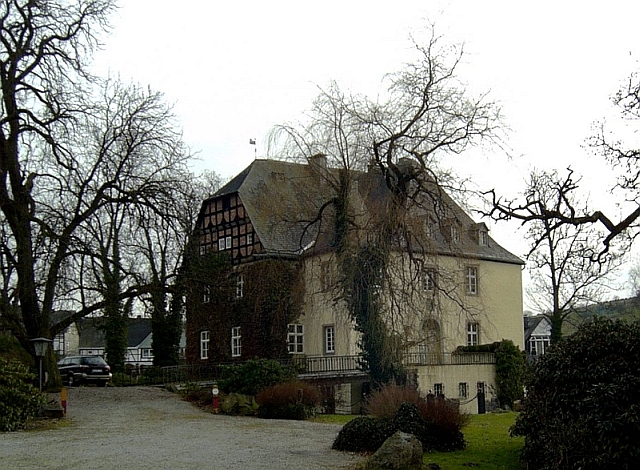 Schloss Bruchhausen in Olsberg-Bruchhausen, Germany.